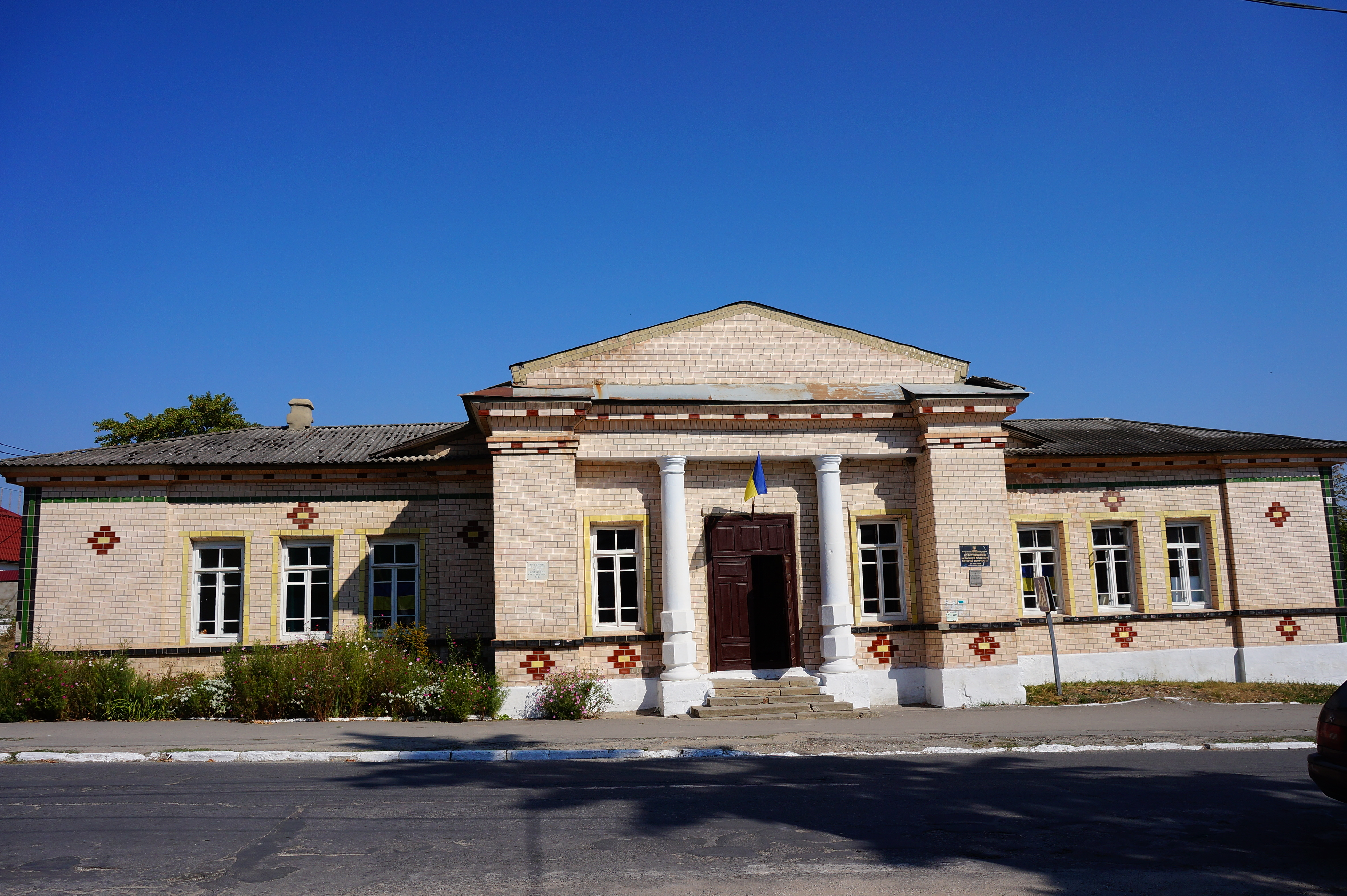 Народний будинок, смт Нова Ушиця, вул. Подільська, 24